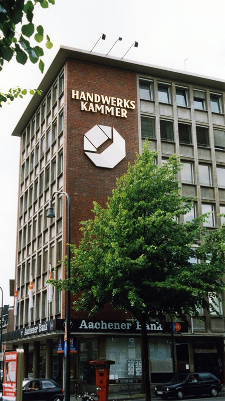 Hauptgebäude der HWK Aachen, unter Denkmalschutz